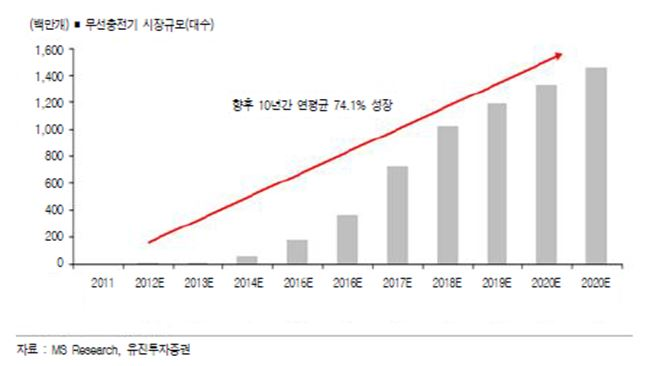 조선말: 무선충전기 시장 증가 예측